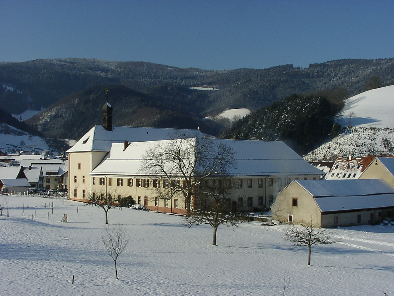 Blick auf das ehemalige Wilhelmitenkloster in Oberried